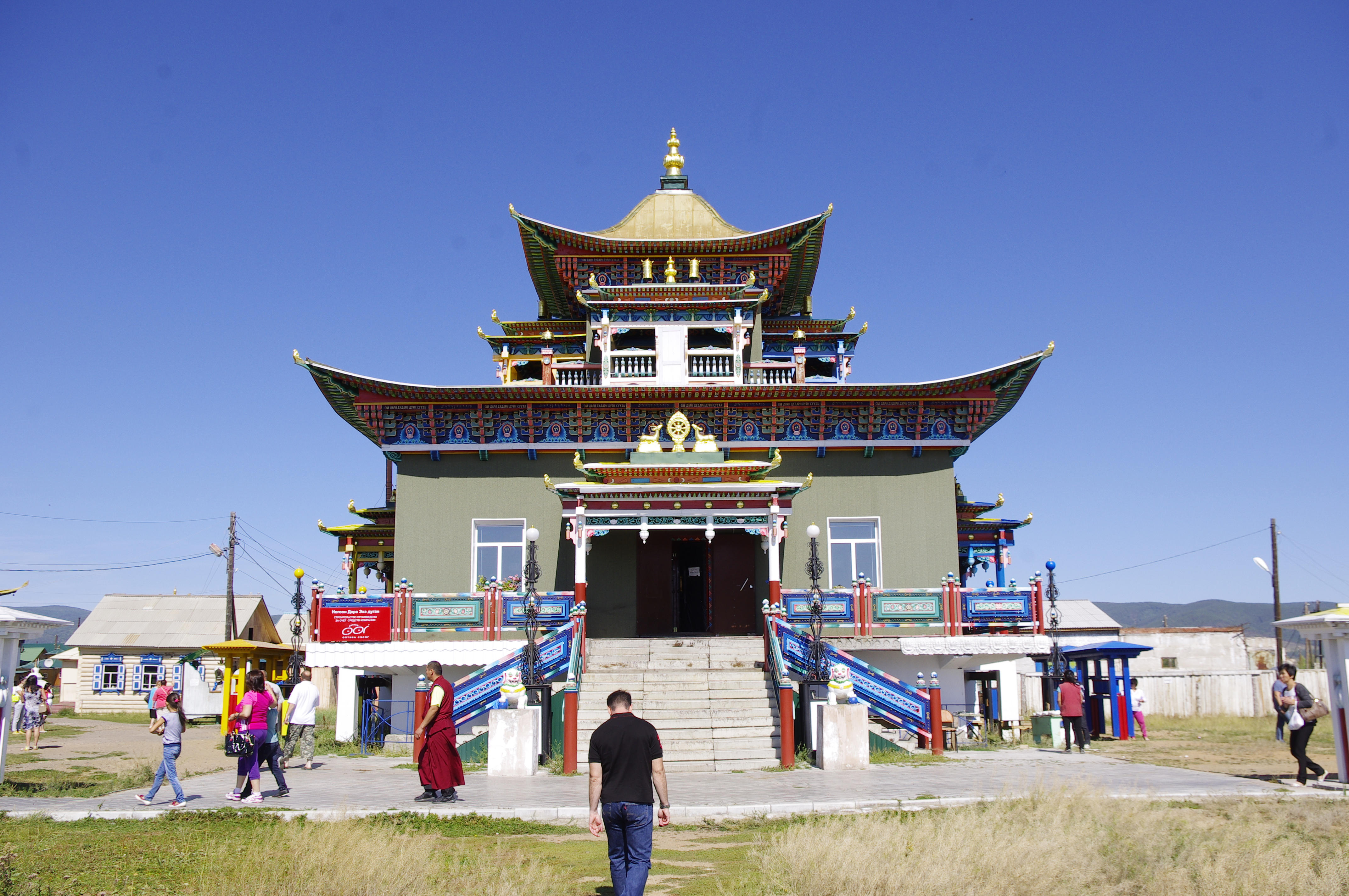 Lato 2013.